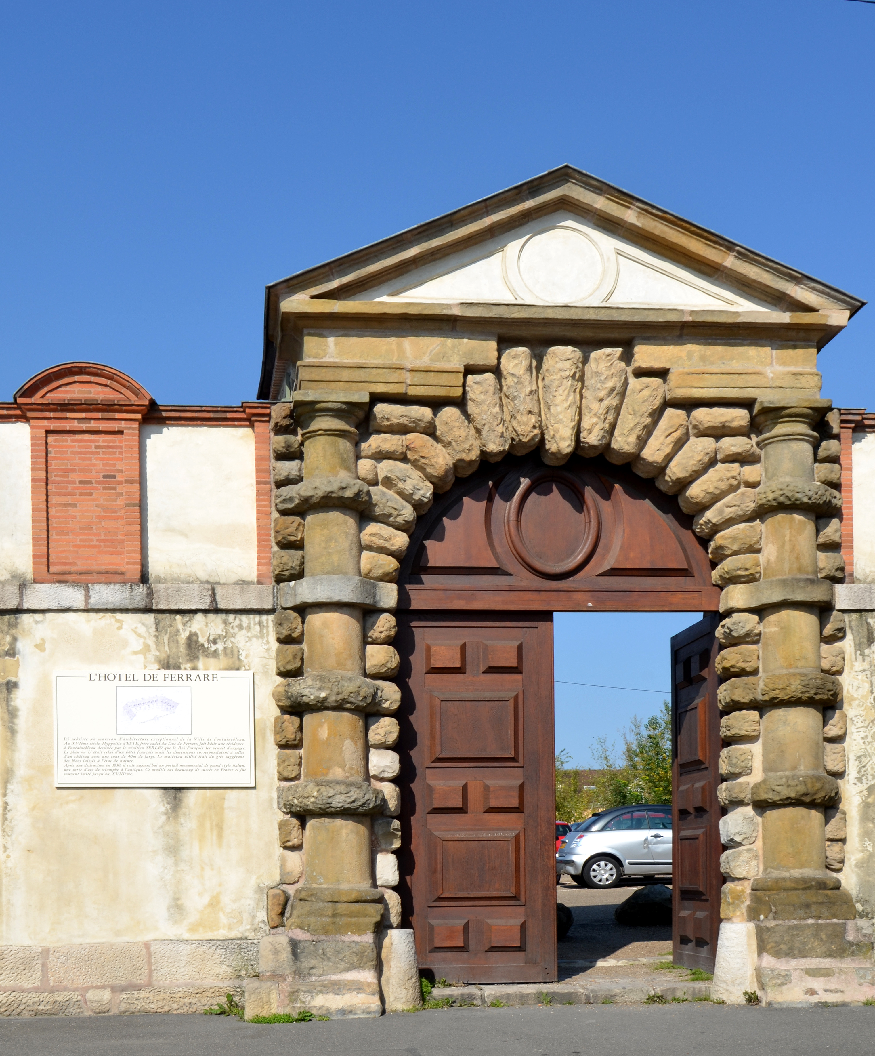 Porte de l'ancien hôtel de Ferrare a Fontainebleau (Seine et Marne, Ile de France, France). Construction du 2e quart 16e siècle, par Sébastien Serlio.